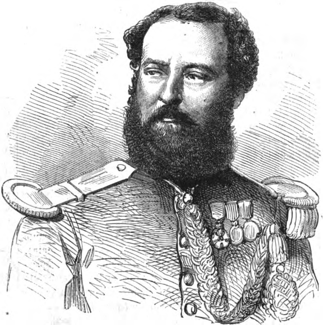 Le commandant De Foucault, tué a Puebla